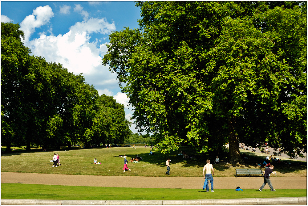 Hyde Park de Londres.